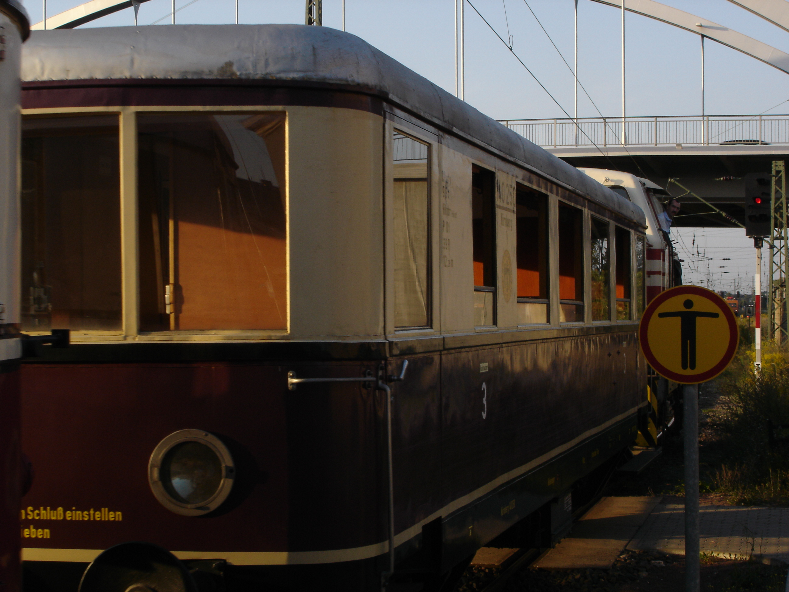 Ein Sonderzug des DWE zum Vulkanausbruch in Wörlitz 2005